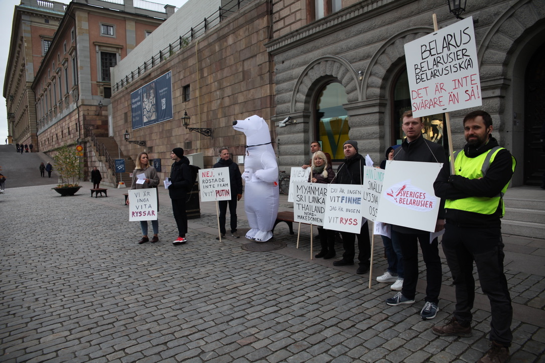 Беларуская (тарашкевіца): Пікет Беларусаў Швэцыі ў Стакгольме 15 кастрычніка 2019